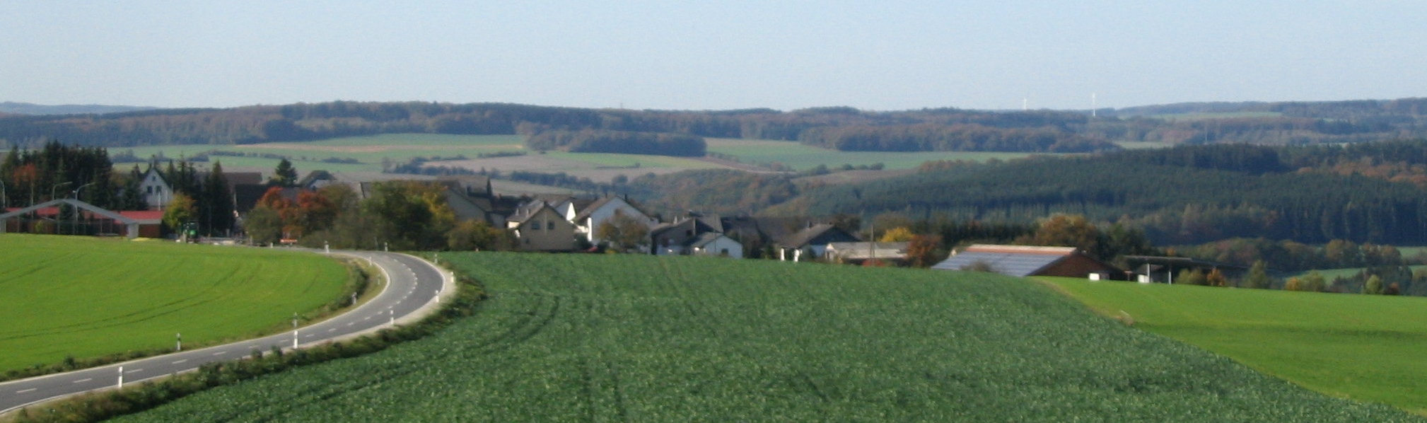 Hecken im Hunsrück aus östlicher Richtung